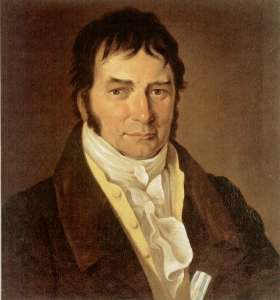 Portrait von Christoph Friedrich Leers